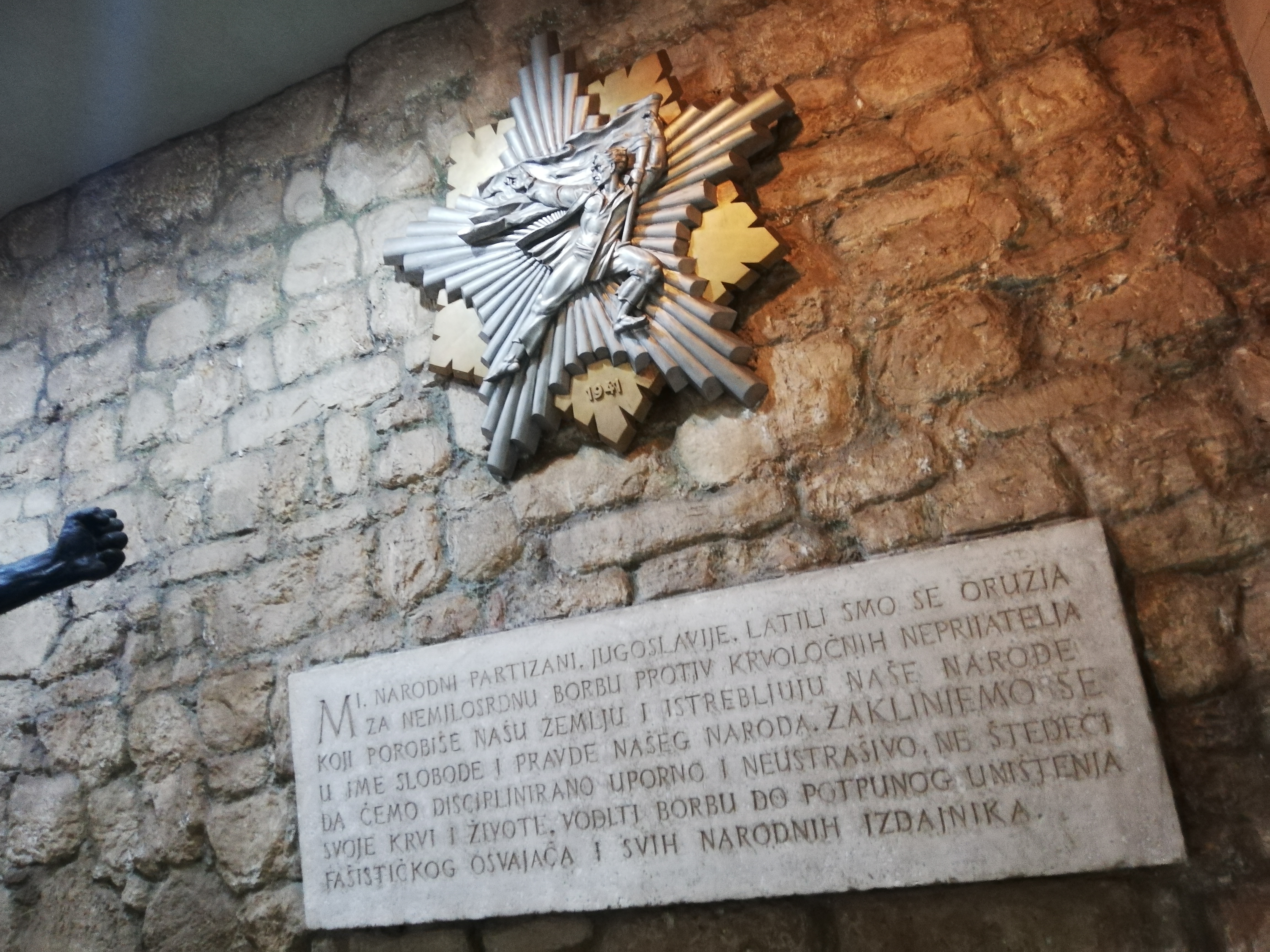 Partizanska spomenica 1941. i tekst partizanske zakletve u Vojnom muzeju u Beogradu